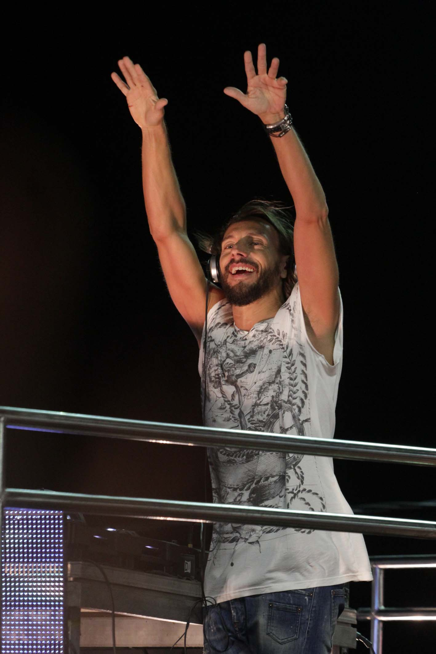 Carnaval 2014 - Farol da Barra - Bob Sinclar